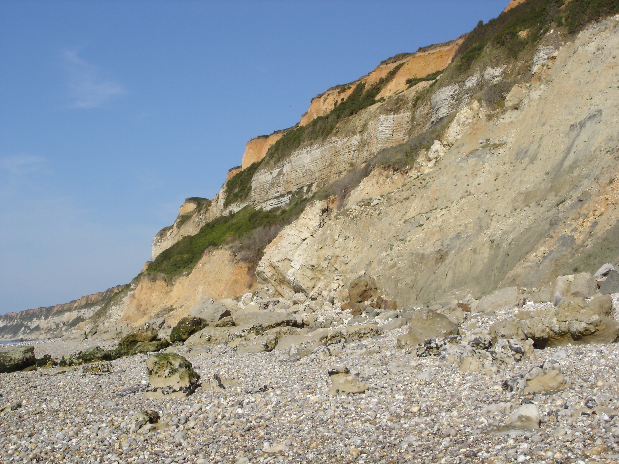 La falaise et la plage à Cauville-sur-Mer (Seine-Maritime) -- Photo amateur prise par moi-même